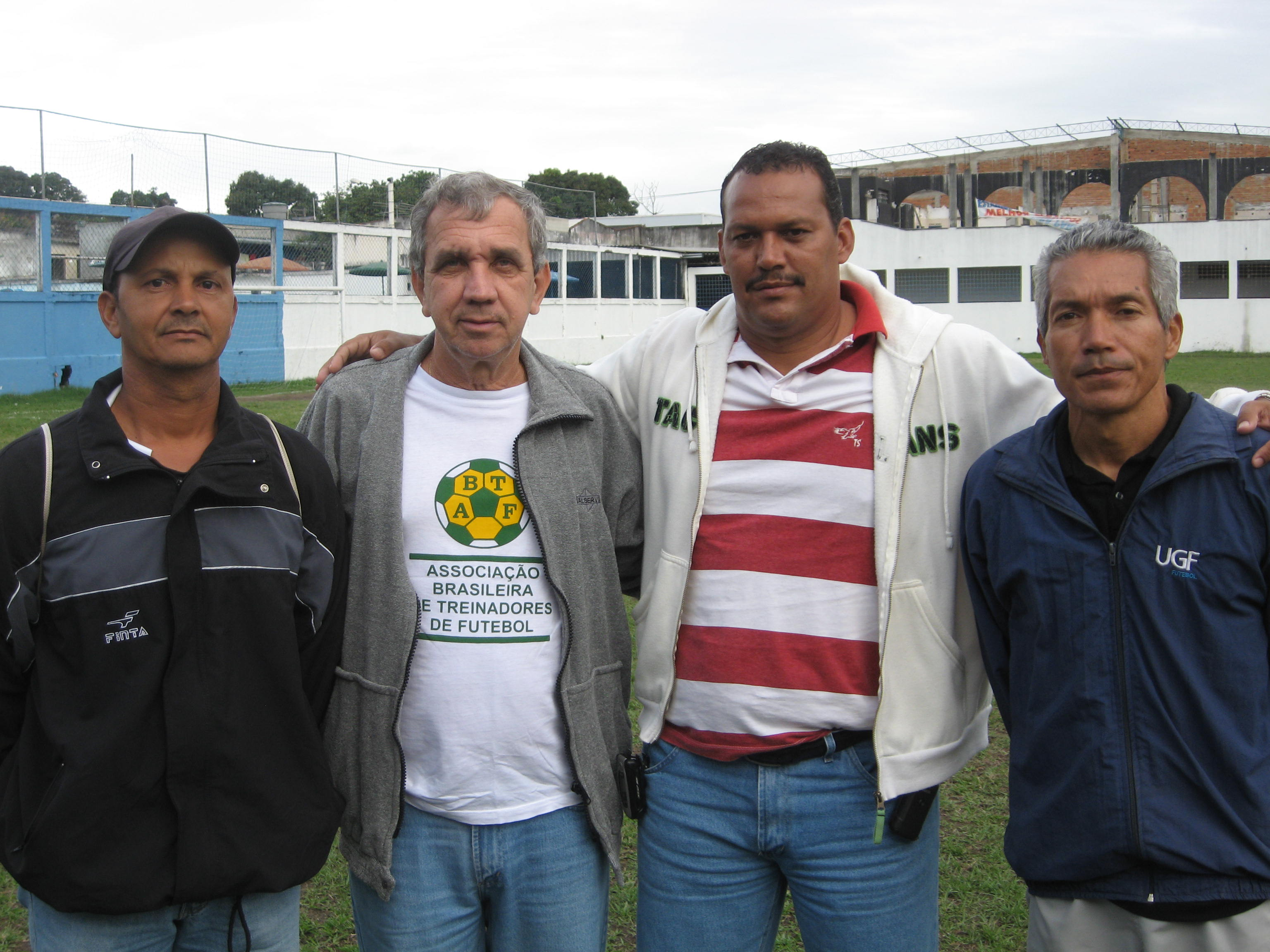 Comissão técnica do União Central Futebol Clube